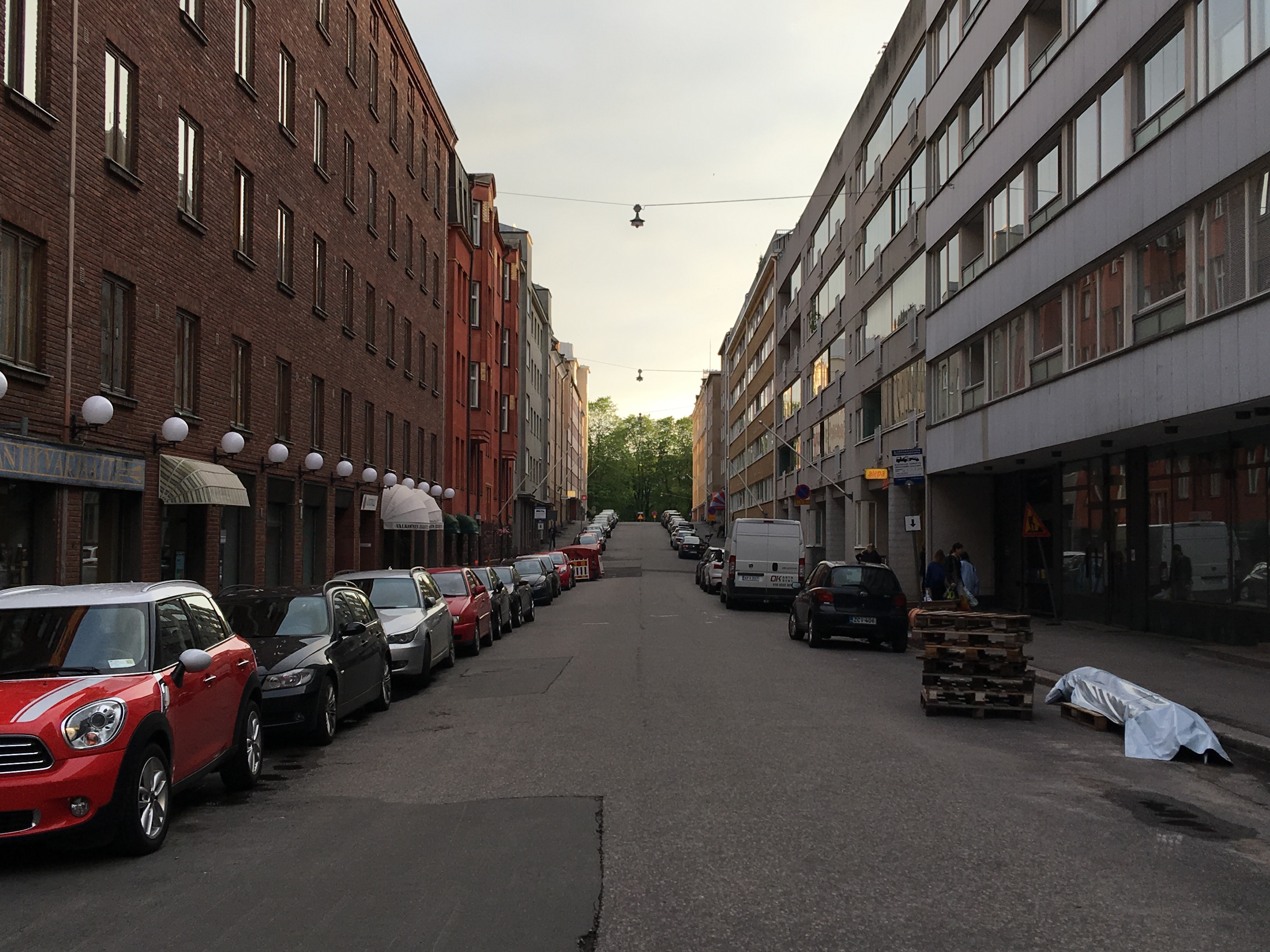 Helsingin Ullanlinnassa sijaitsevaa Vuorimiehenkatua kuvattuna Kapteeninkadun risteyksestä kesäkuussa 2016.